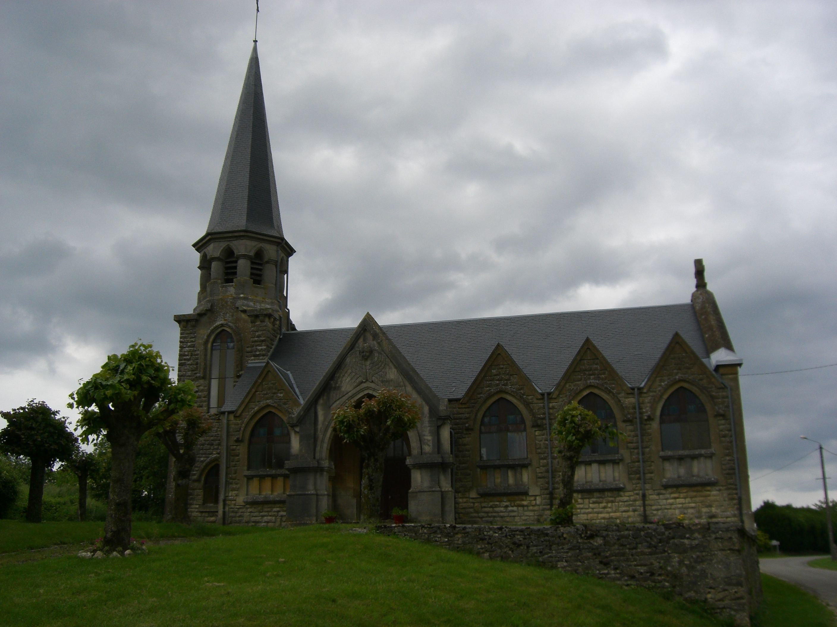 Eglise d'Imécourt (Ardennes, France)